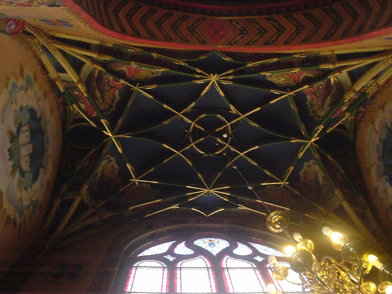 Sklepienie kaplicy św. Wawrzyńca przy kościele Mariackim w Krakowie